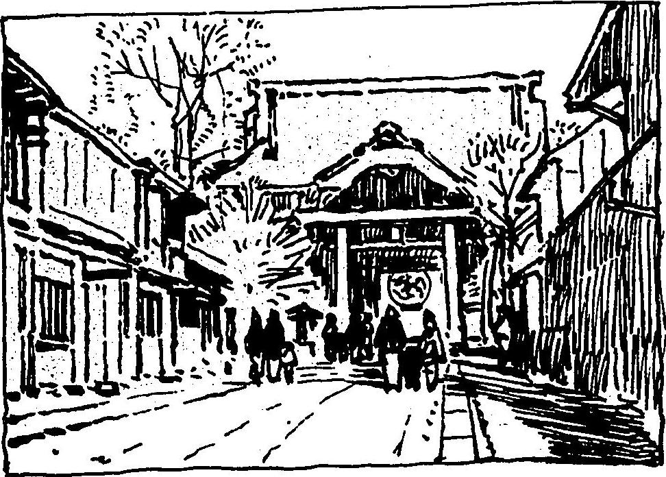 『明治美術会第三回報告』85 油画 神田明神 脇屋本吉